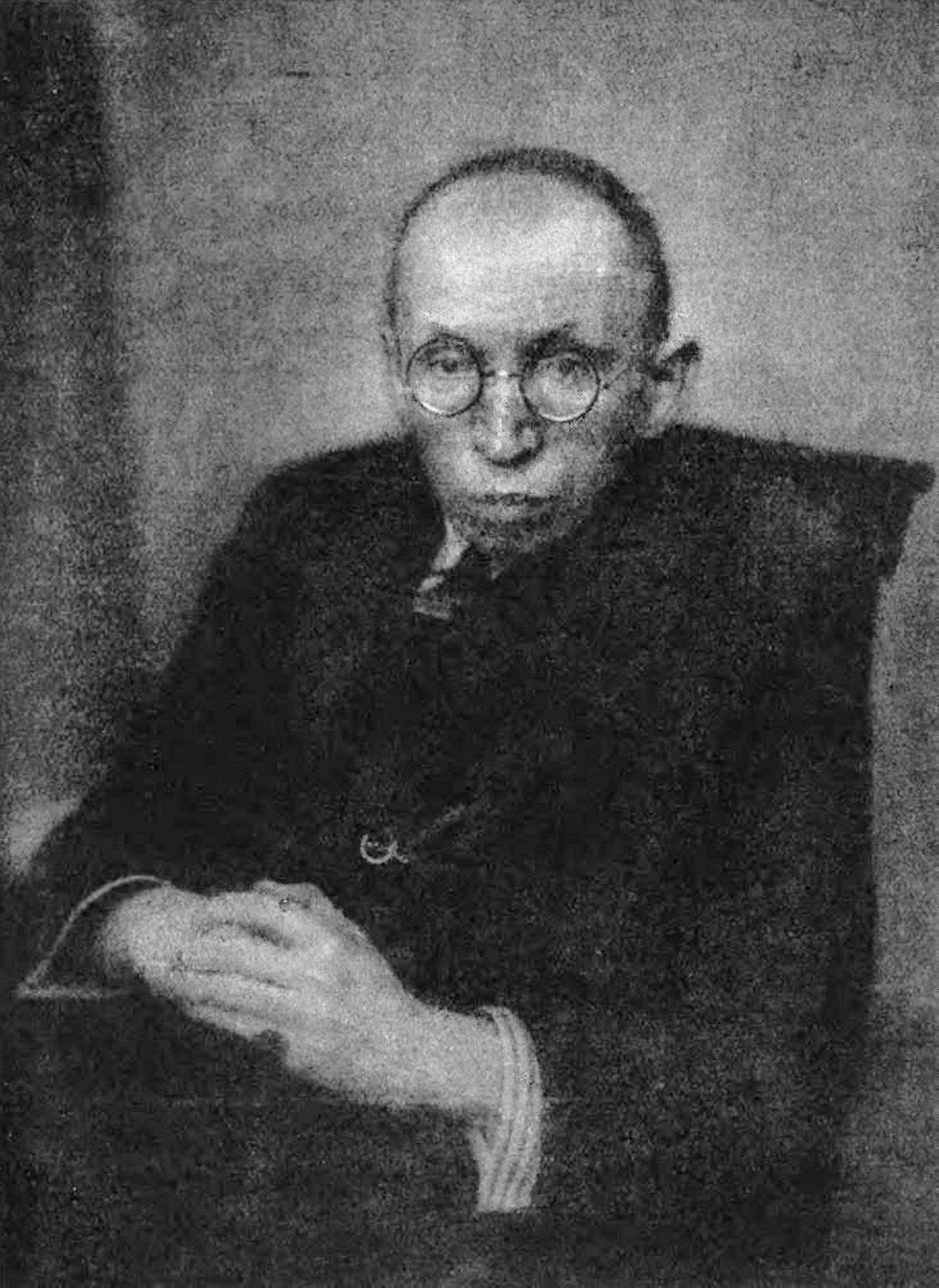 Porträt von Max Herrmann-Neiße. Fotografiert von Max Glauer.